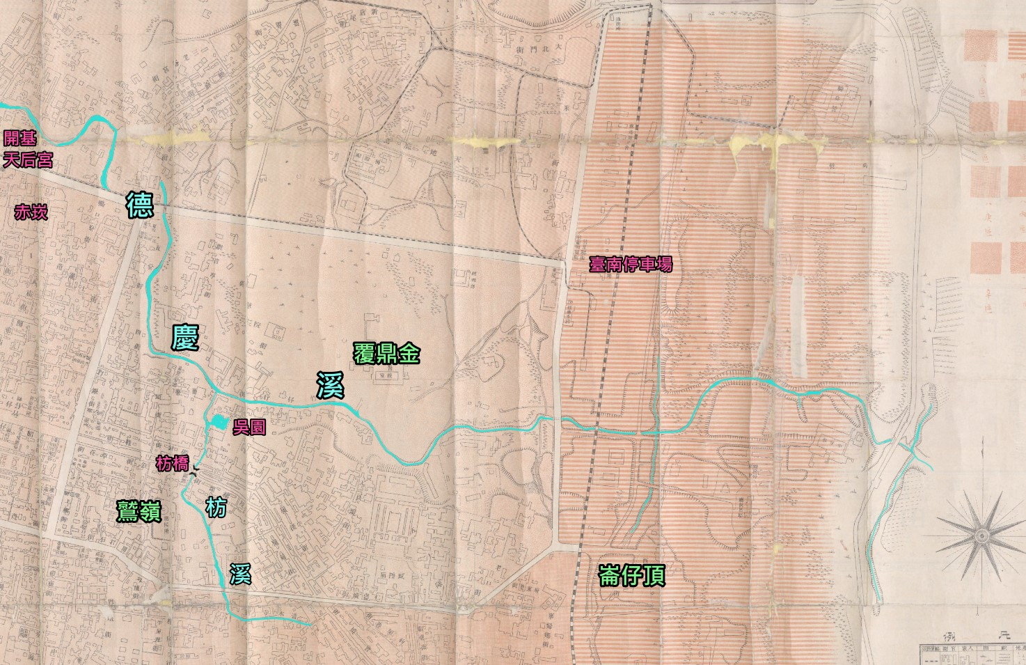 德慶溪流域圖